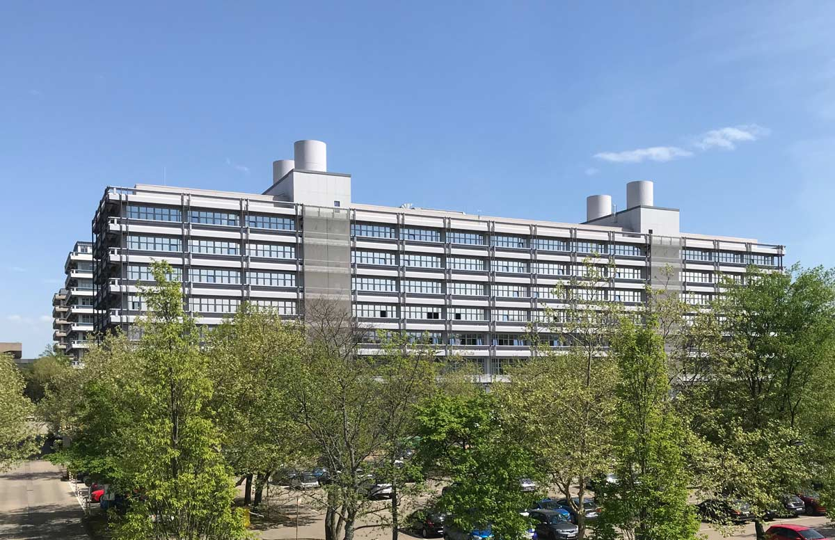 Vita Campus Bochum: Geschäftstelle der ARGE Krebs, Universitätsstr.140